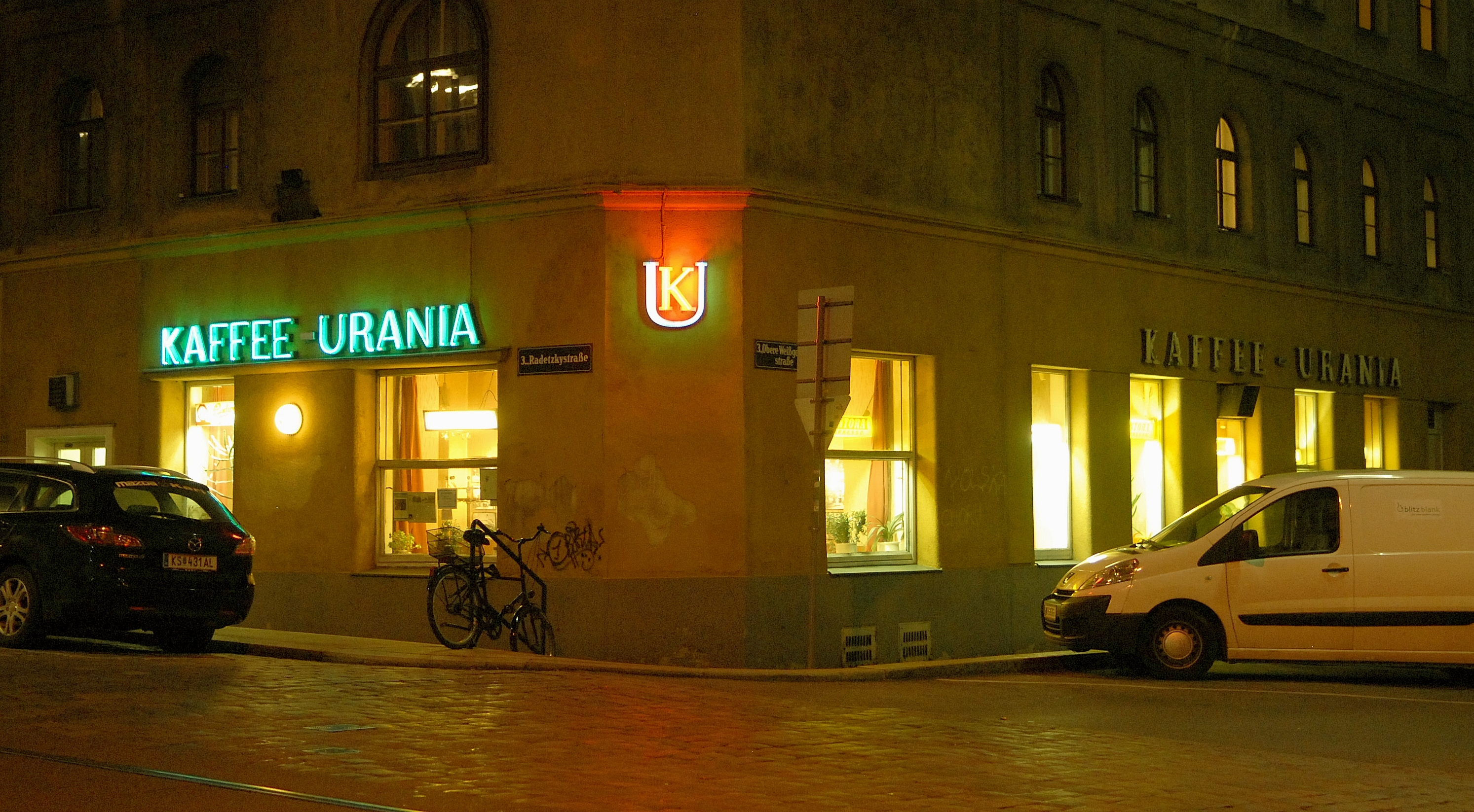 Kaffe Urania, 1030 Wien, Radetzkystraße 24